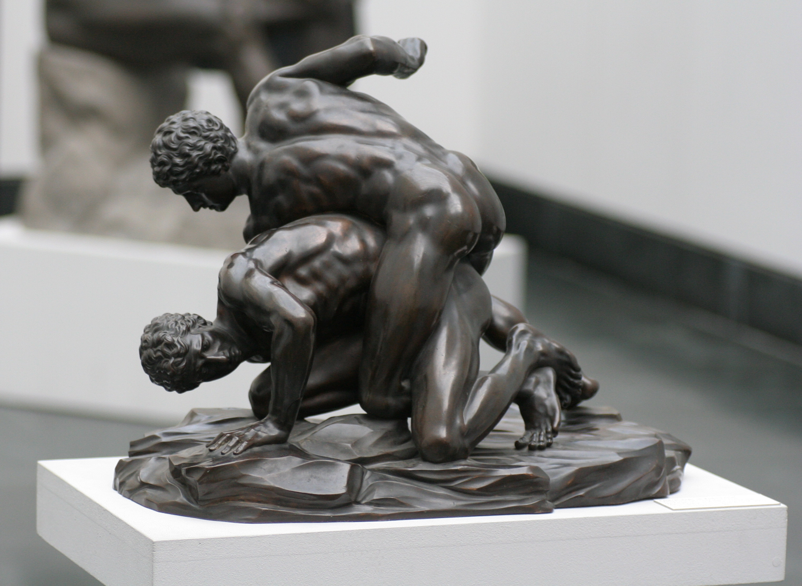 Pankratiasten im Bodenkampf. Verkleinerte Nachbildung einer römischen Marmorplastik, die wiederum auf ein griechisches Vorbild des 3.Jhdts v.Chr. zurückgeht. Die Kopie ist von ca. 1900. Staatliche Antikensammlungen.